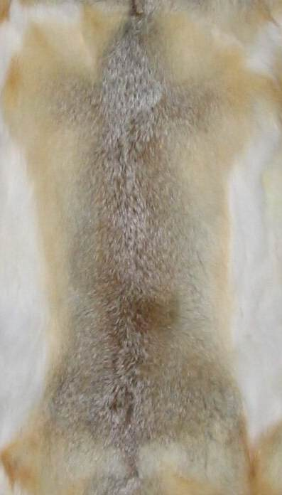 Mongolian fox plate (cutted image) / Tafeln (Ausschnitt davon) aus mongolischen Füchsen (Halbfertigprodukt) auf der Pelzmesse Fur & Fashion in Frankfurt.